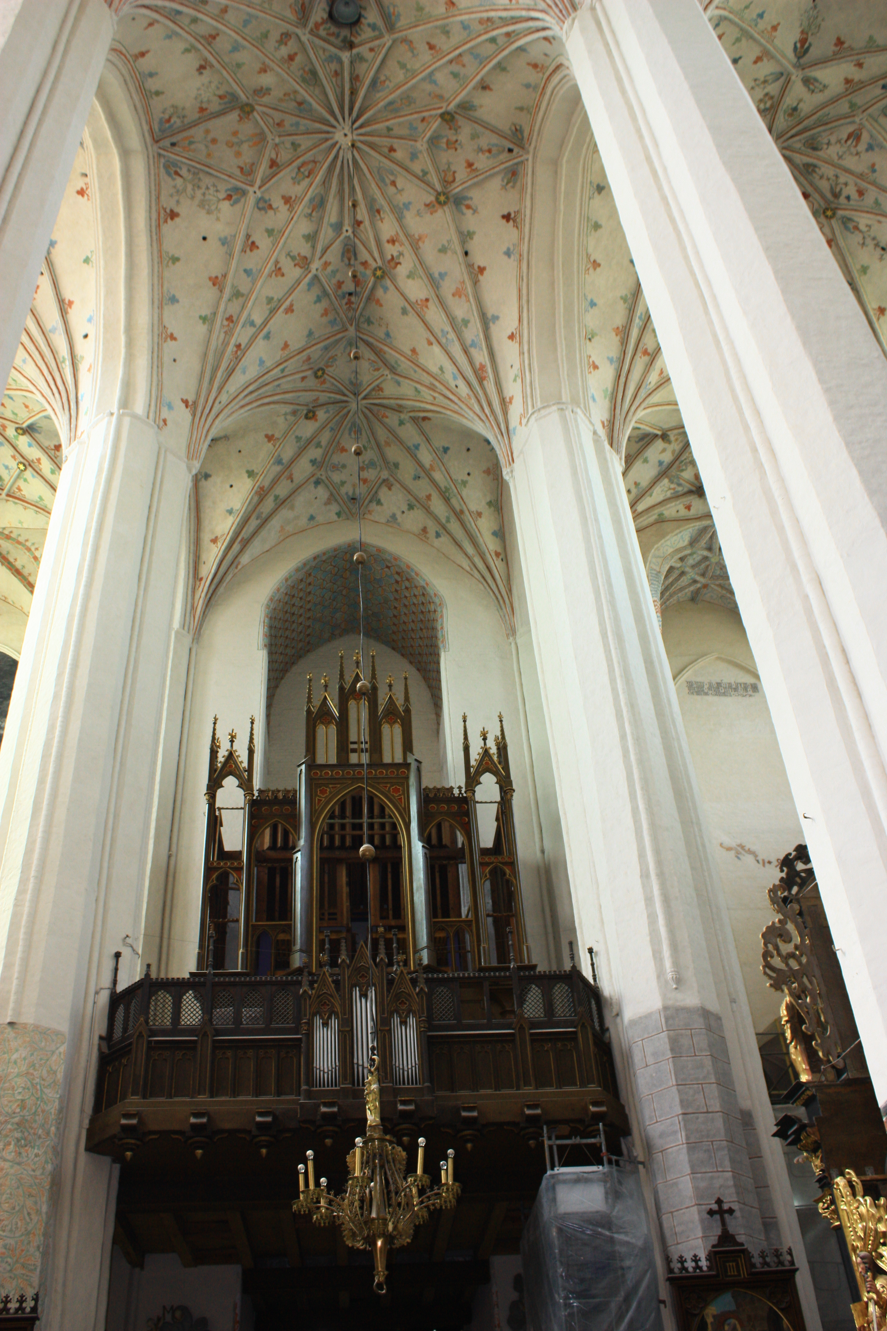 Toruń, kościół par., ob. katedra pw. św. Jana Chrzciciela i św. Jana Ewangelisty, 2 poł. XIII, XIV-XV